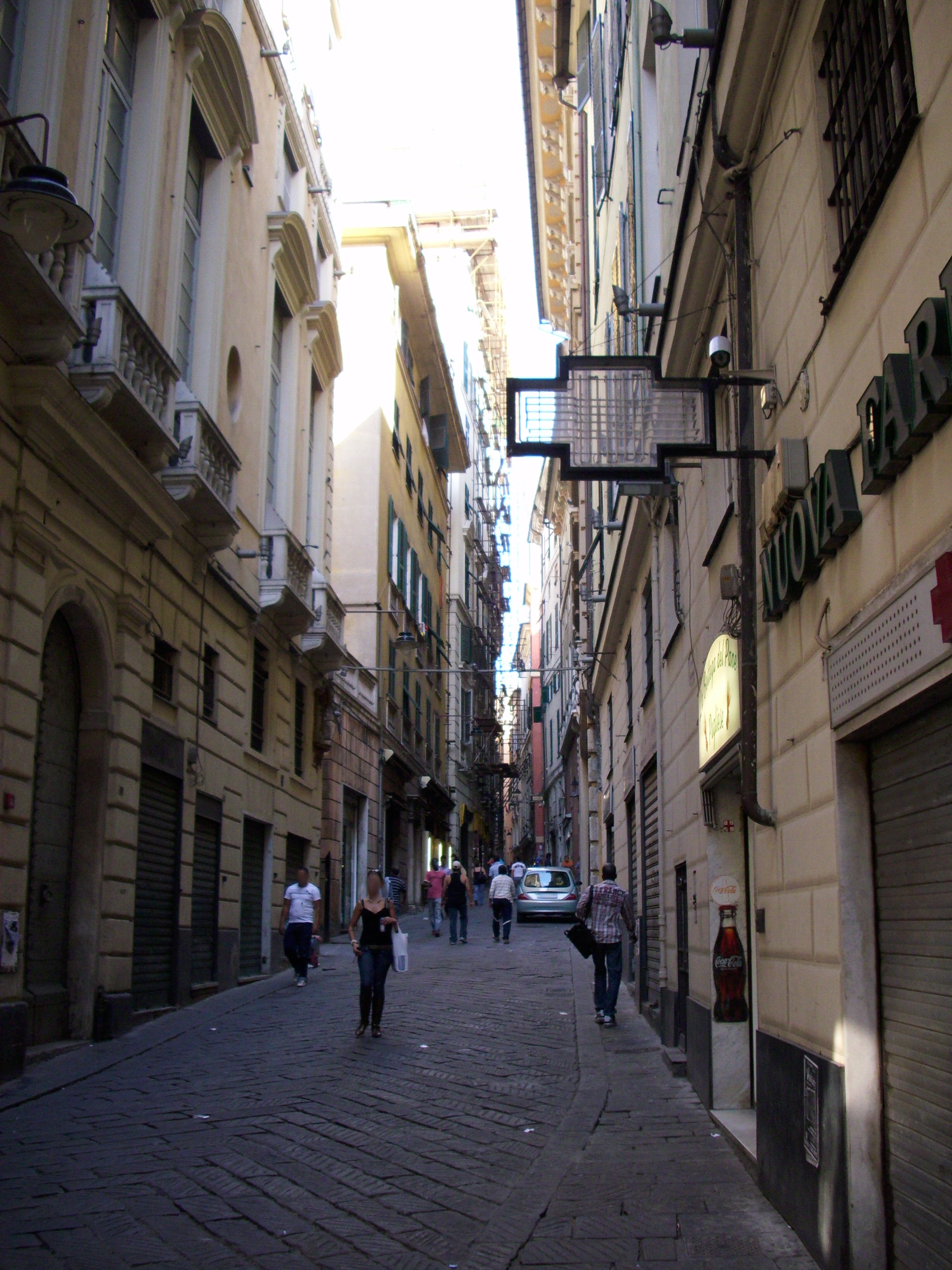 Porta dei Vacca e la retrostante via del Campo, a Genova